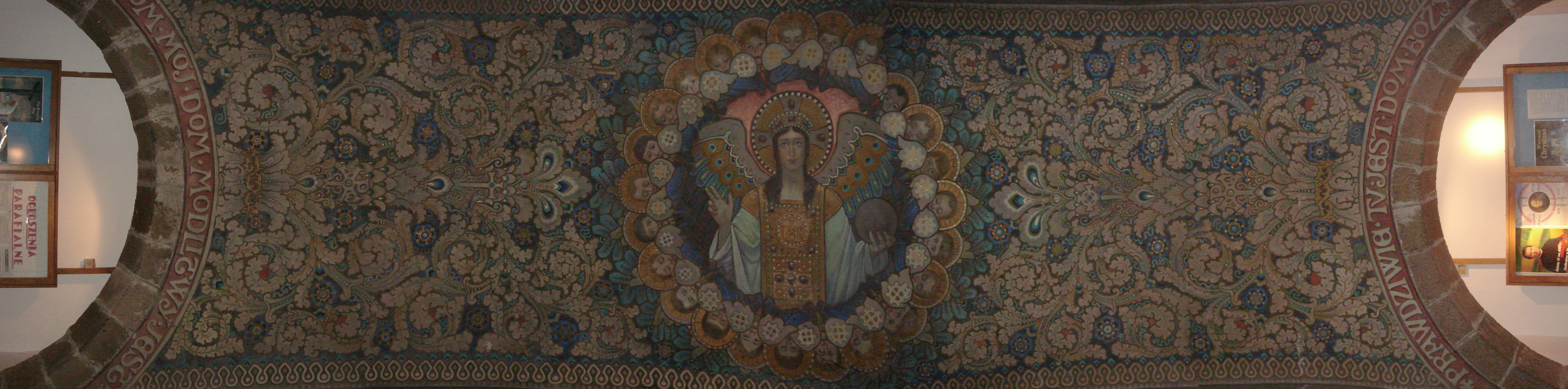 Nawa w bazylice Zwiastowania Najświętszej Marii Panny - Czerwińsk nad Wisłą.